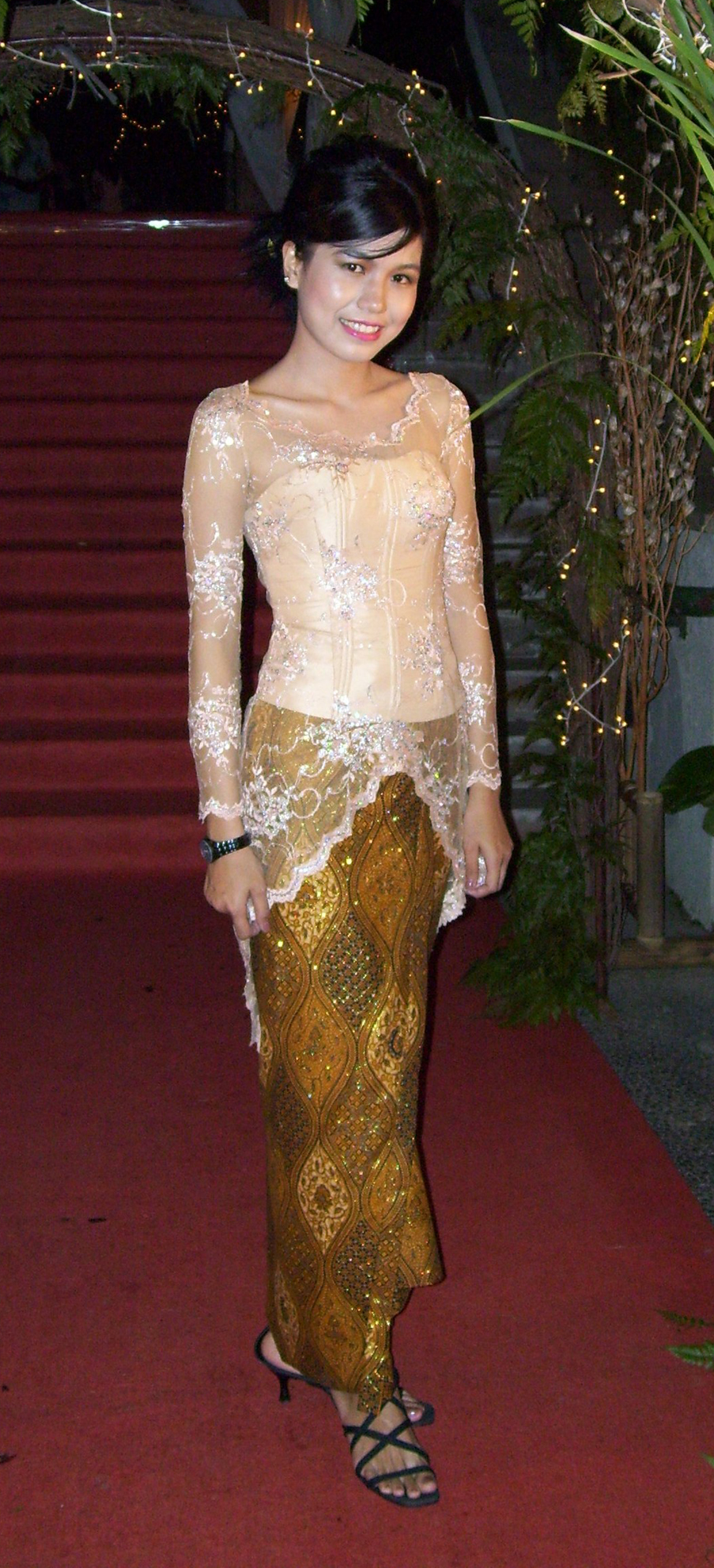 Kebaya model: fanbo